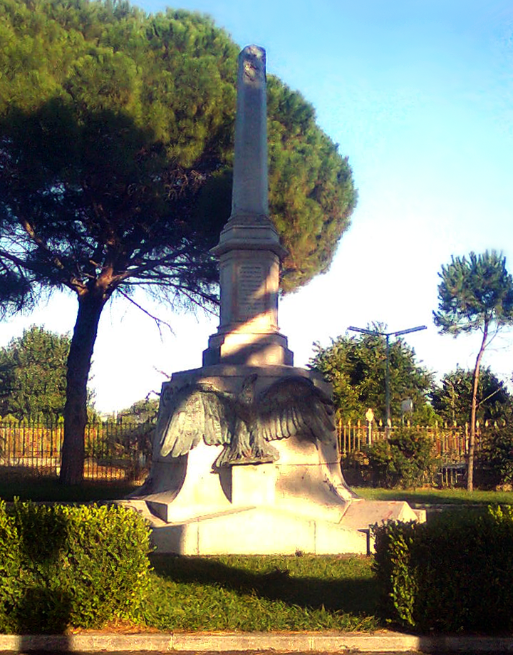 Nome scultura: Monumento ai 5 martiri di GeraceUbicazione: Locri, Via Regina Margherita di Savoia